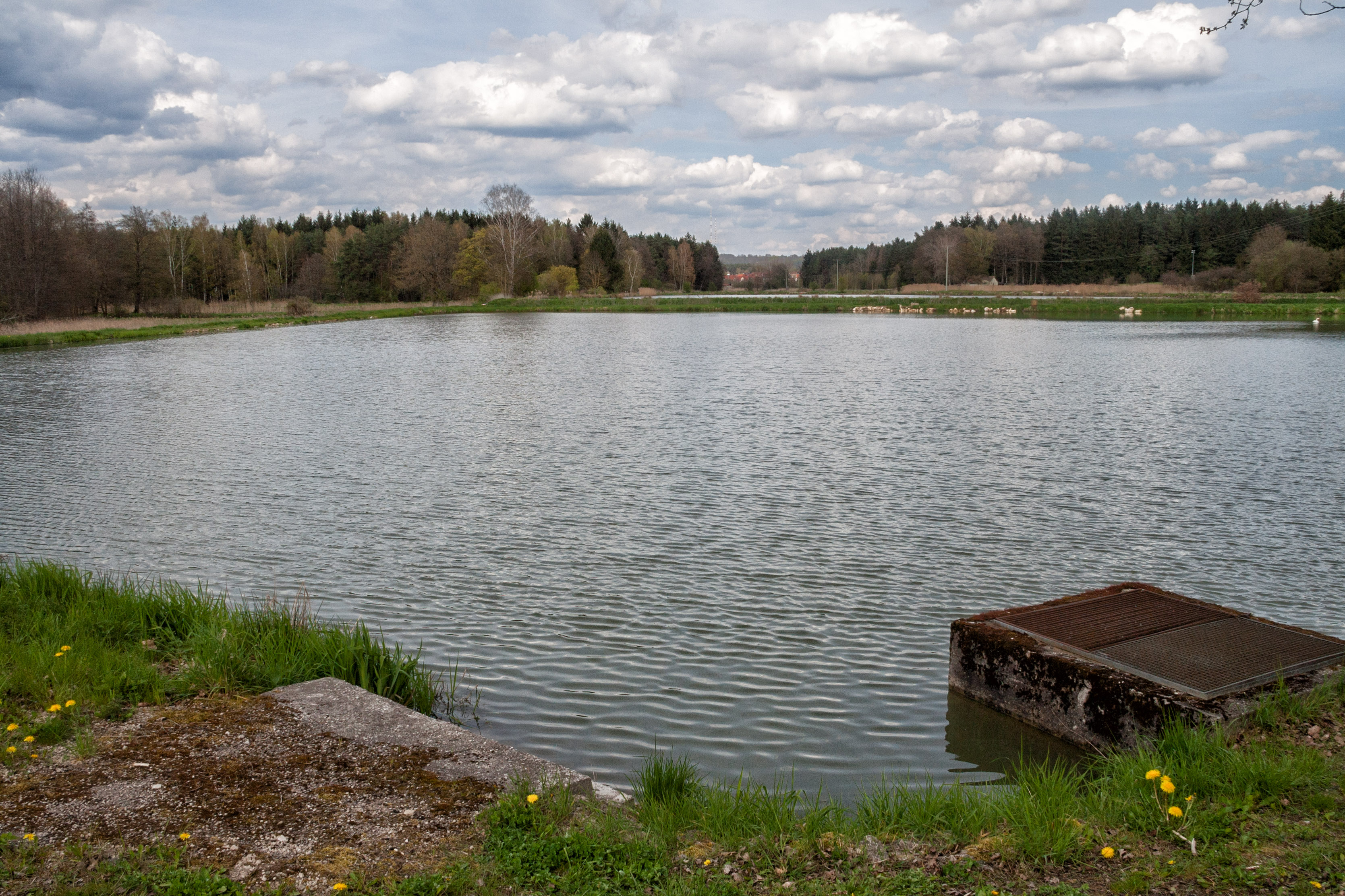 Dennenloher Weiher, Dennenlohe, Pyrbaum, FFH-Gebiet Moosgraben und Dennenloher Weiher